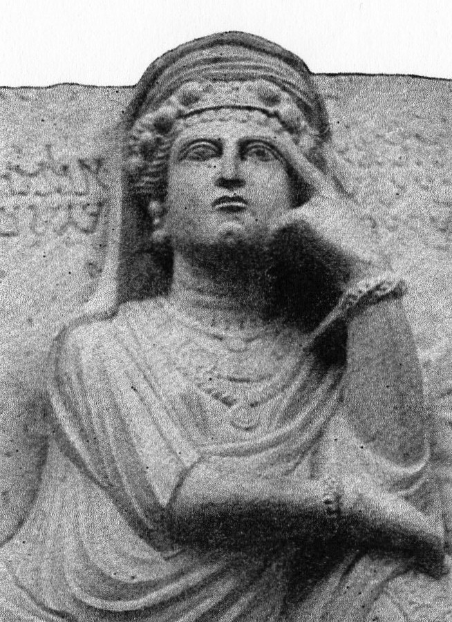 Bassorilievo, presunto ritratto di Zenobia regina di Palmira (240-275) (museo di Damasco)